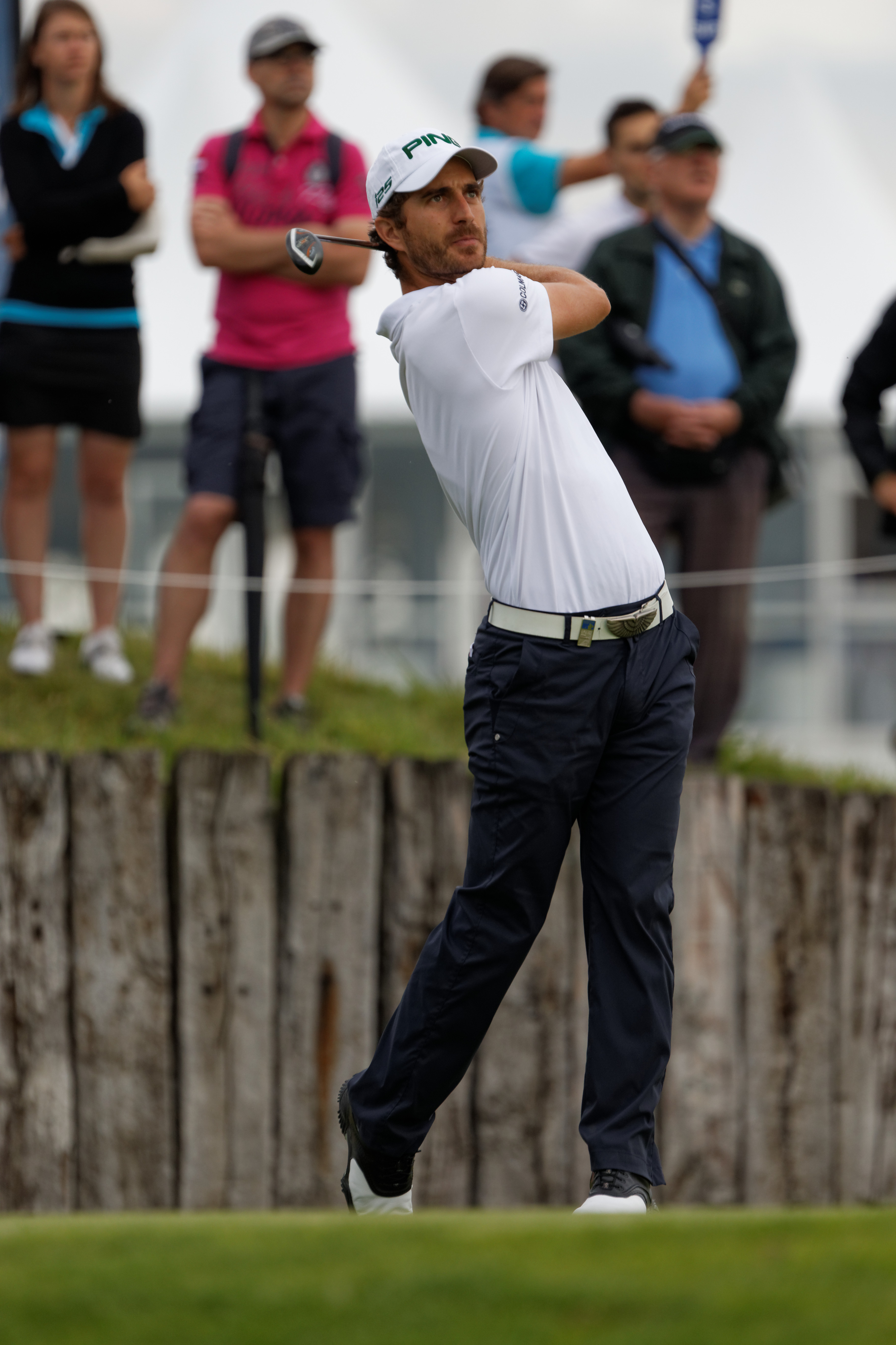 Alejandro Cañizares lors du second tour de l'Open de France 2014